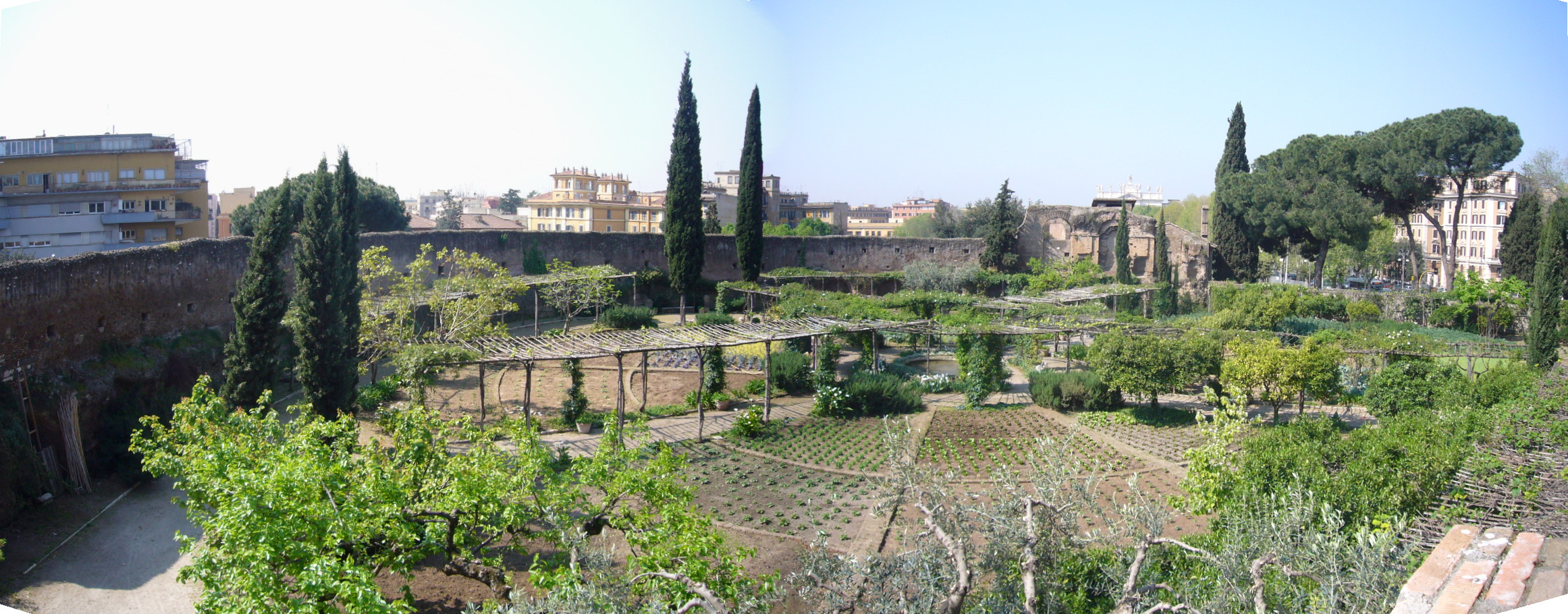 Roma, orto monastico di Santa Croce in Gerusalemme dentro l'Anfiteatro Castrense